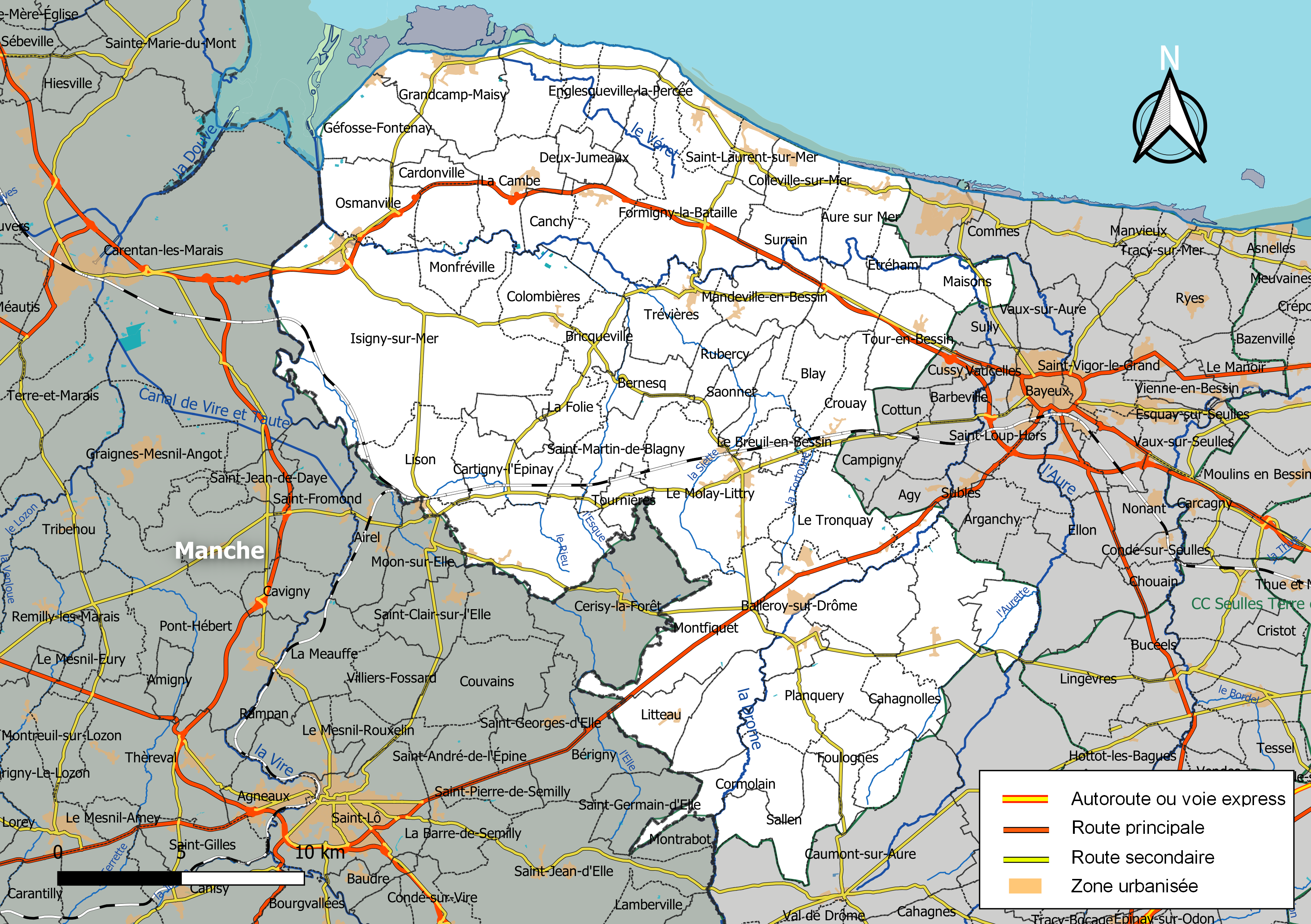 Carte géographique de la Communauté de communes Isigny-Omaha Intercom, département du Calvados, France. Composition au 1er janvier 2019.